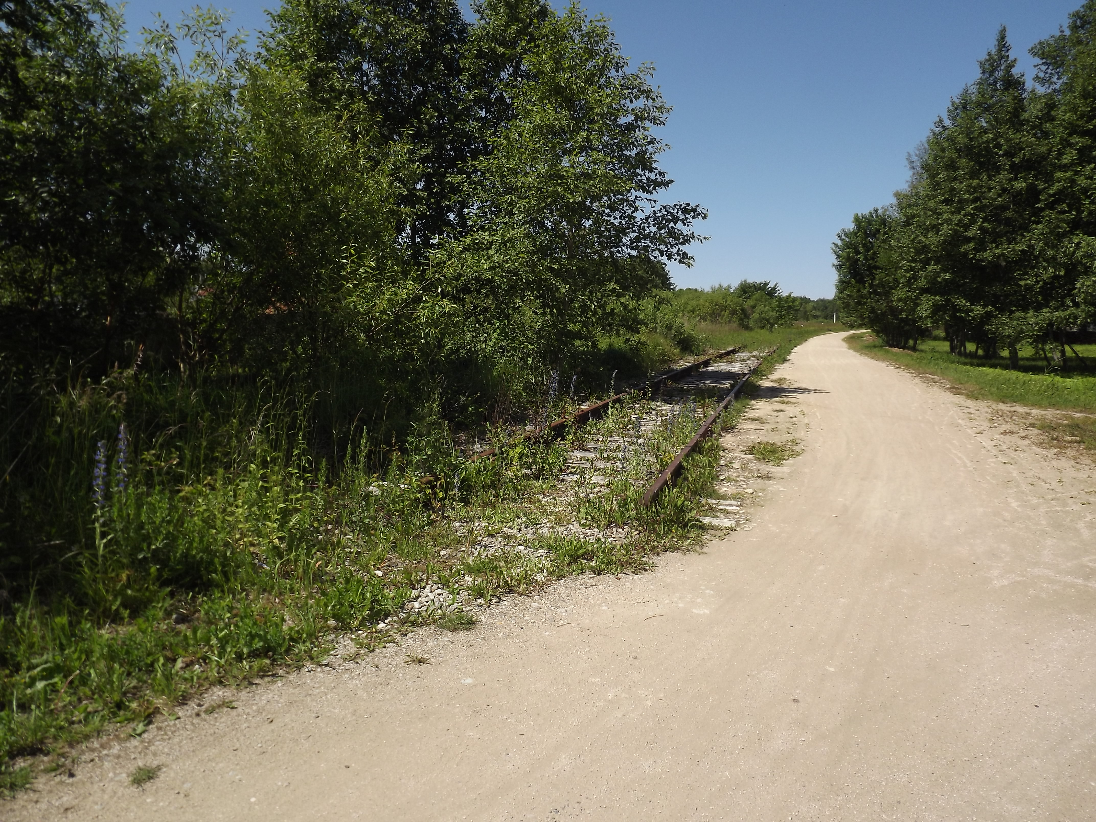 Alles jäetud raudtee Haapsalus.